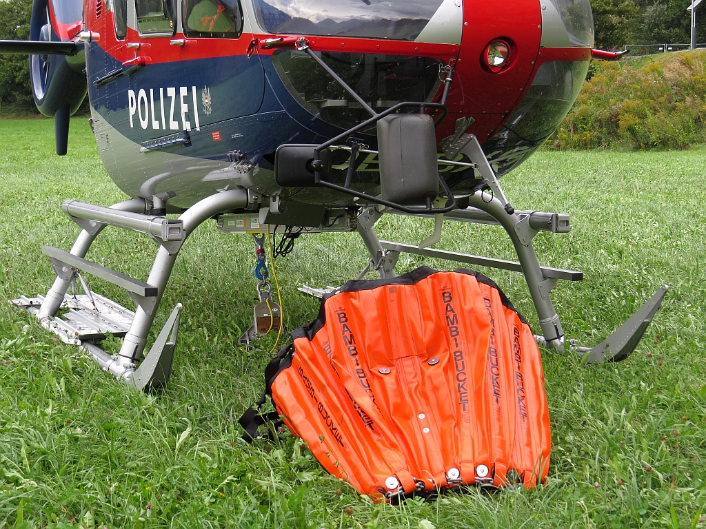 Ein Eurocopter EC135 mit einem Löschwasserbehälter